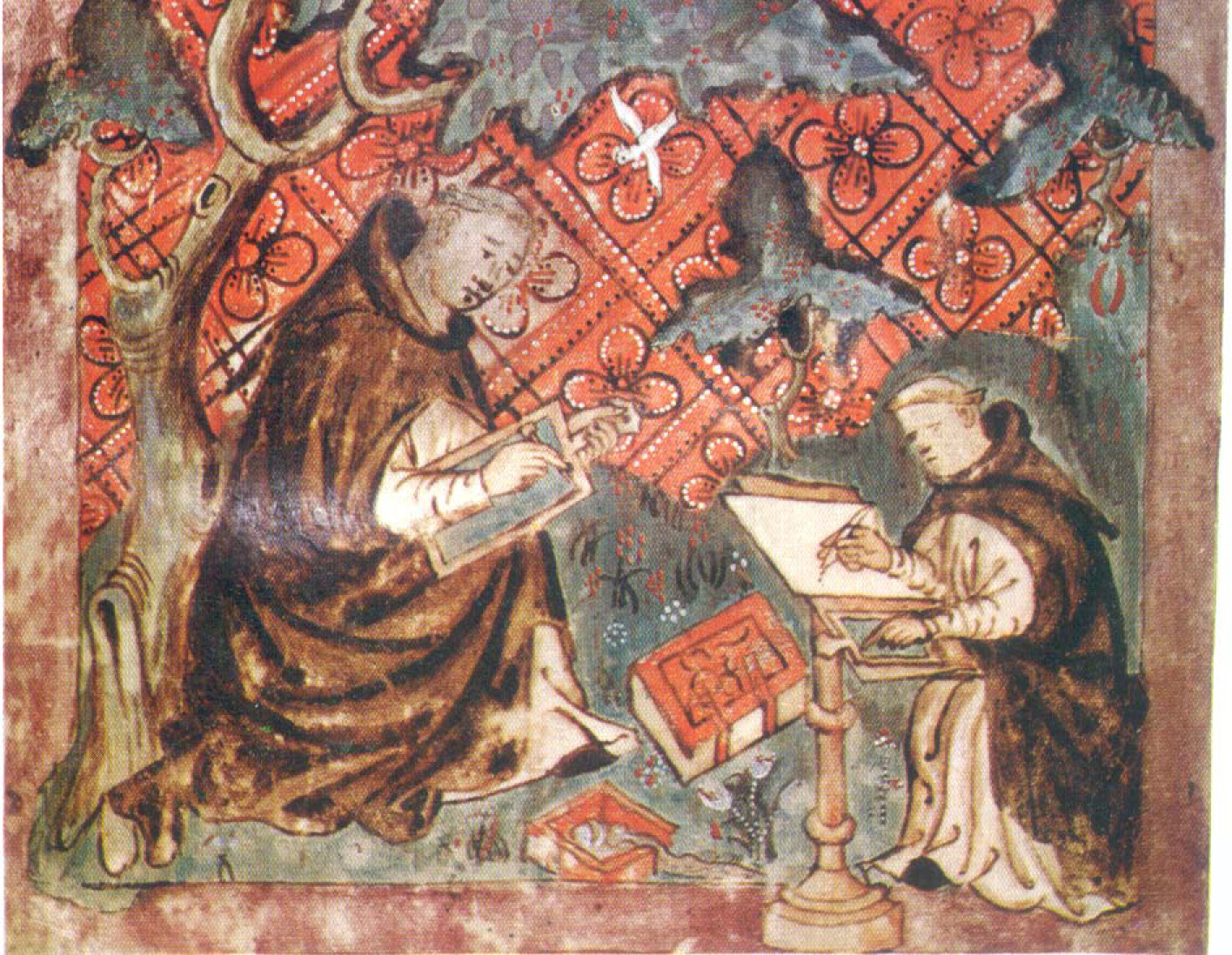 Uitsnede van een reproductie van een veertiende-eeuws handschrift. Brussel KB 19.295-97, fol. 2v. Verzamelhandschrift Jan van Ruusbroec, Vanden gheesteliken tabernakel, Spieghel der eeuwegher salicheit en Van seven trappen